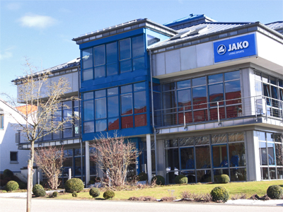 Firmenzentrale der JAKO AG in Hollenbach